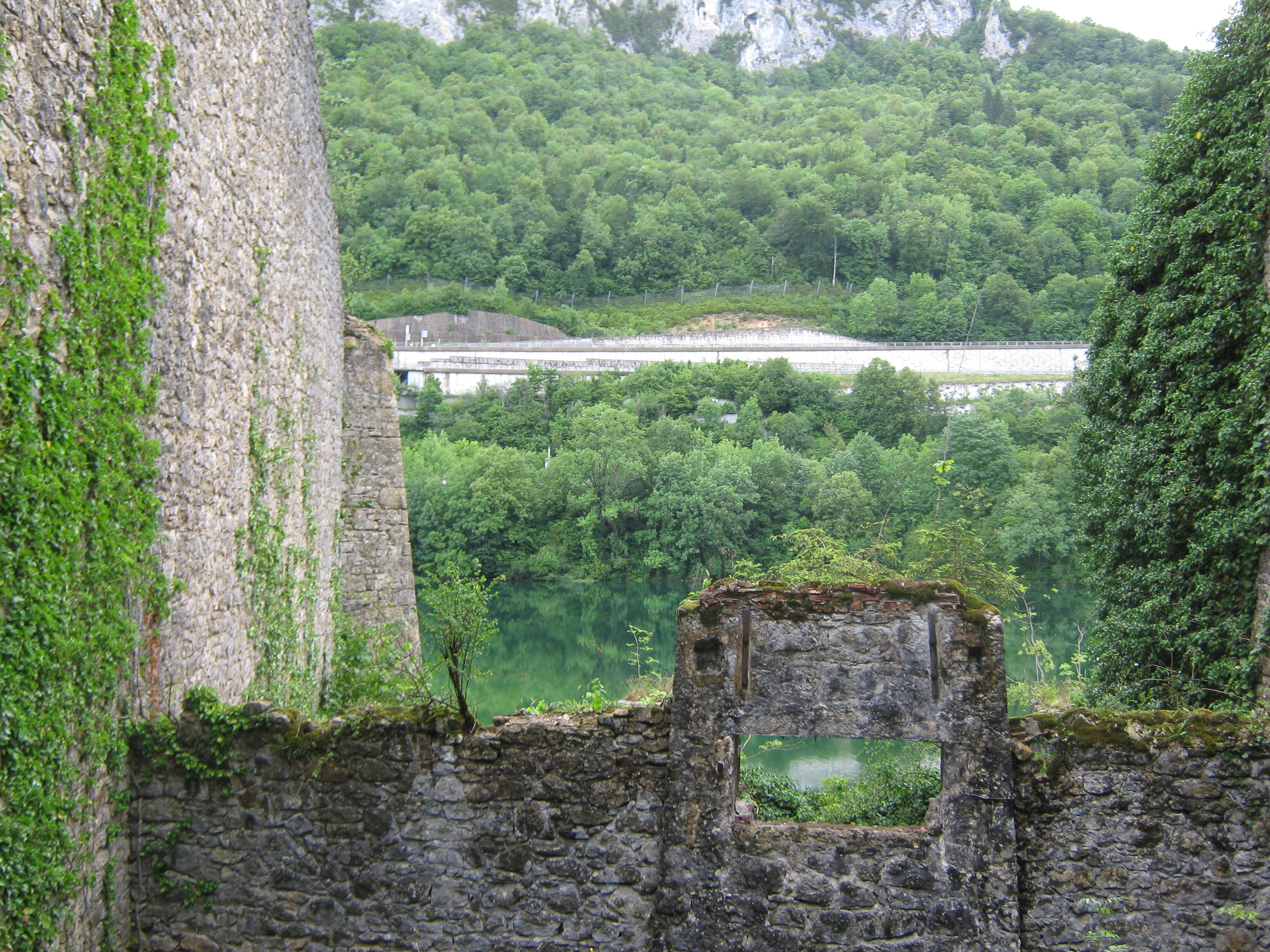 Le lac de Sylans avec au premier plan une usine en ruine